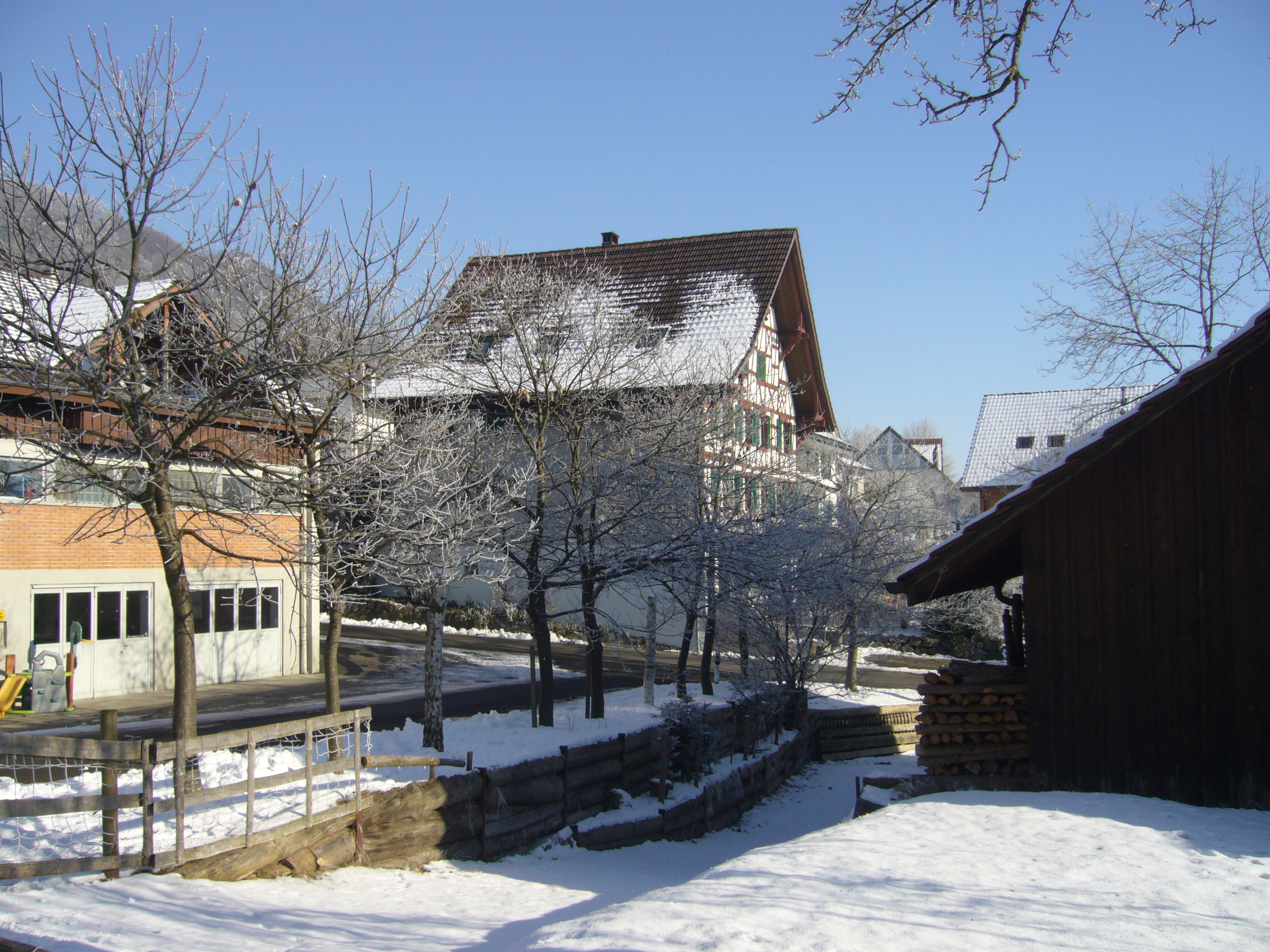 Häuser und Obstbäume zu Stettfurt.